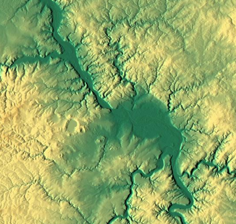 Relief des Mittelrheins mit der Lahnsteiner Pforte im Norden des Oberen Mittelrheintals nebst Lahnmündung, dem Neuwieder Becken nebst Moselmündung, der Andernacher Pforte und der Linz-Hönninger Talweitung nebst Ahrmündung